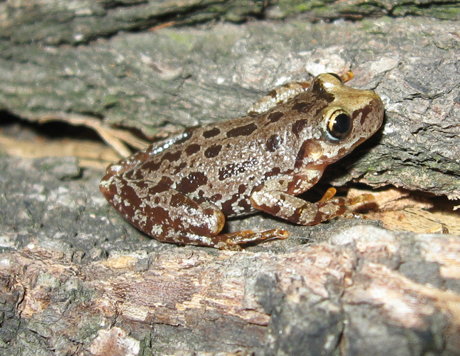 Scinax uruguayus